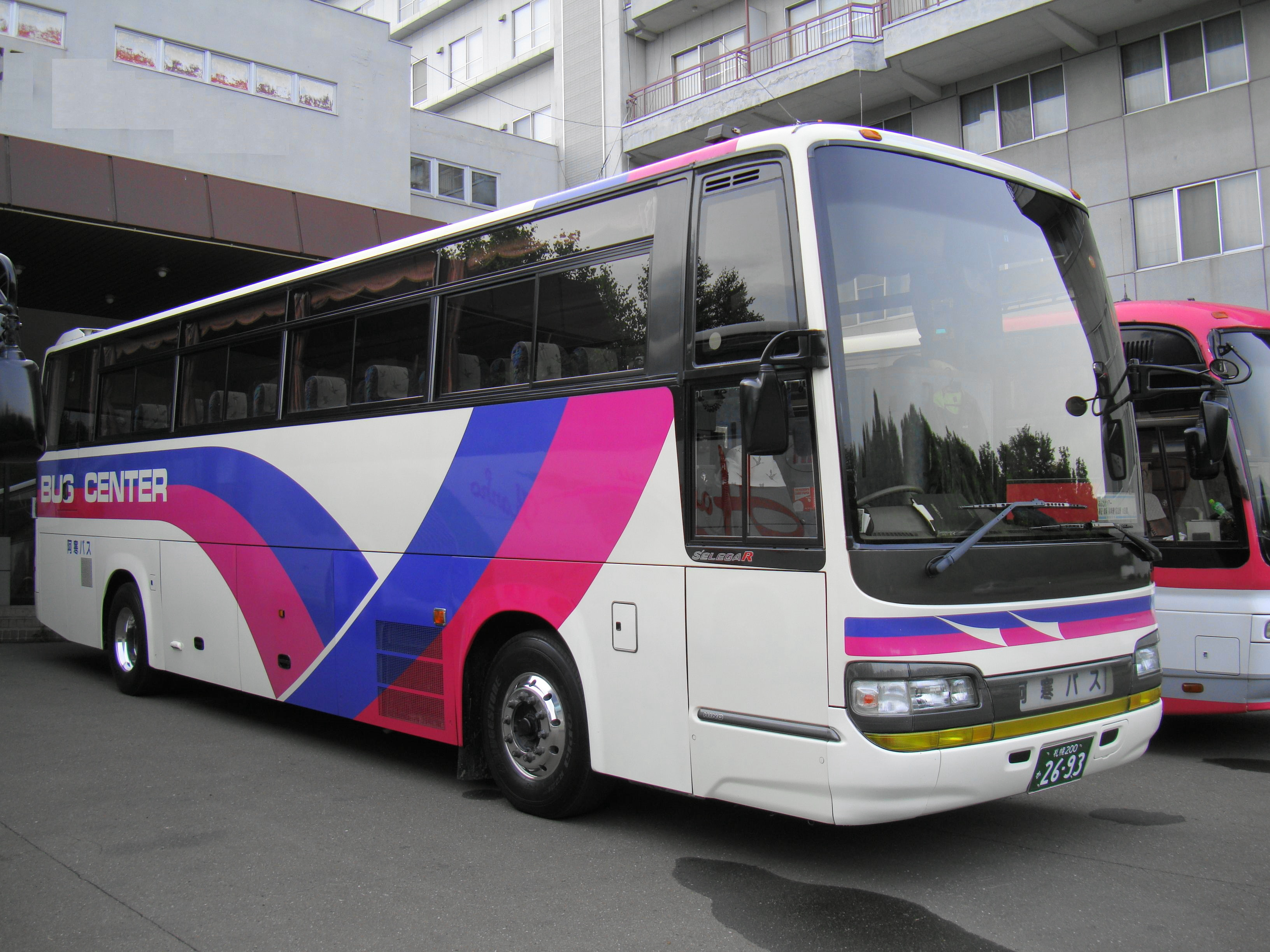 BUS CENTER